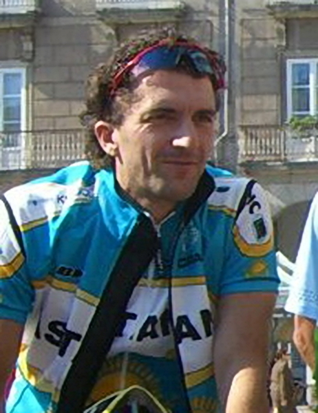 Marcos Serrano, ciclista de Galiza